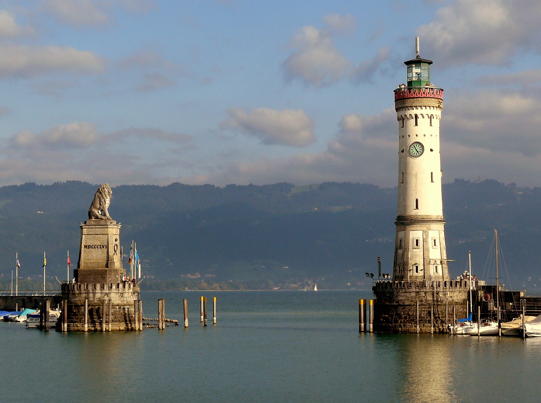 Hafeneinfahrt von Lindau (Bodensee) mit dem bayerischen Löwen und dem neuen Leuchtturm